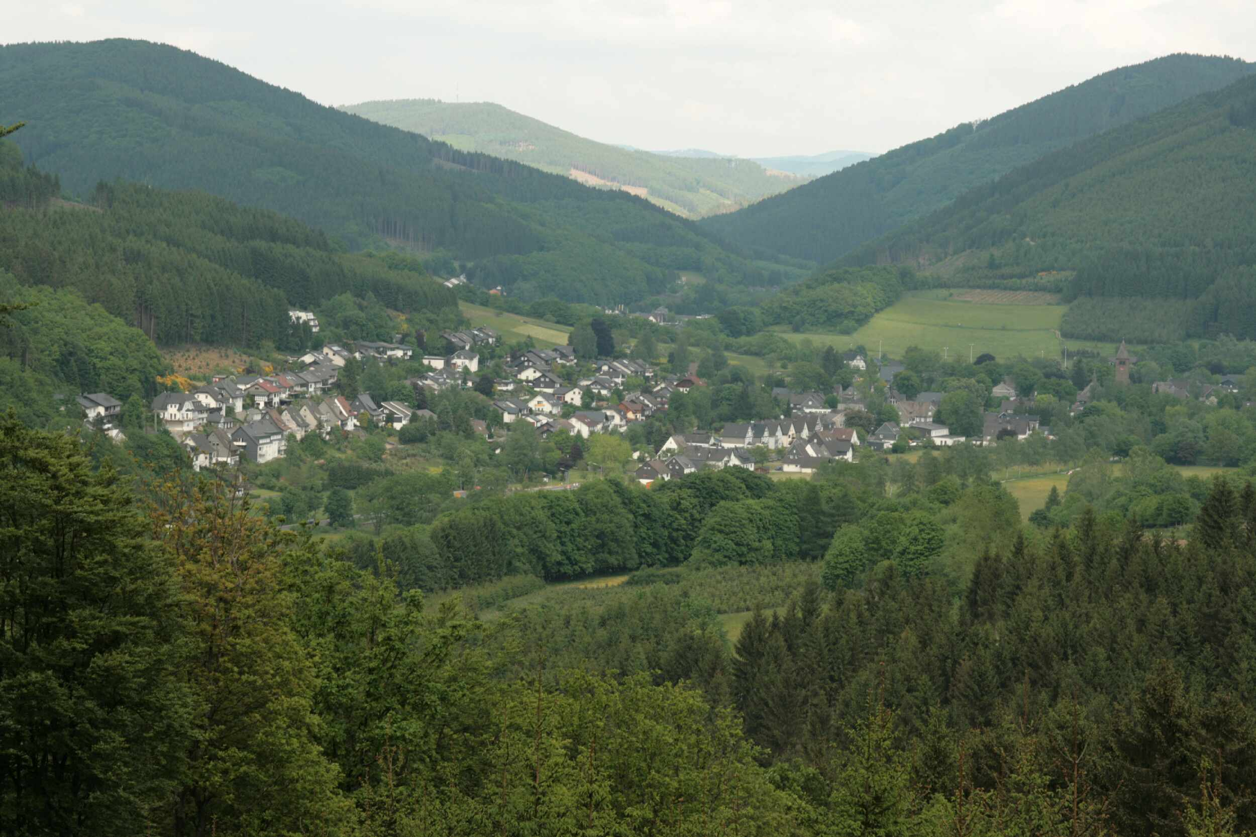 Saalhausen, Blick vom Kriegerweg (Rennacken) eigenes Foto Aufnahmedatum: 24.05.2008 --Wolfgang Poguntke 07:37, 25 May 2008 (UTC)